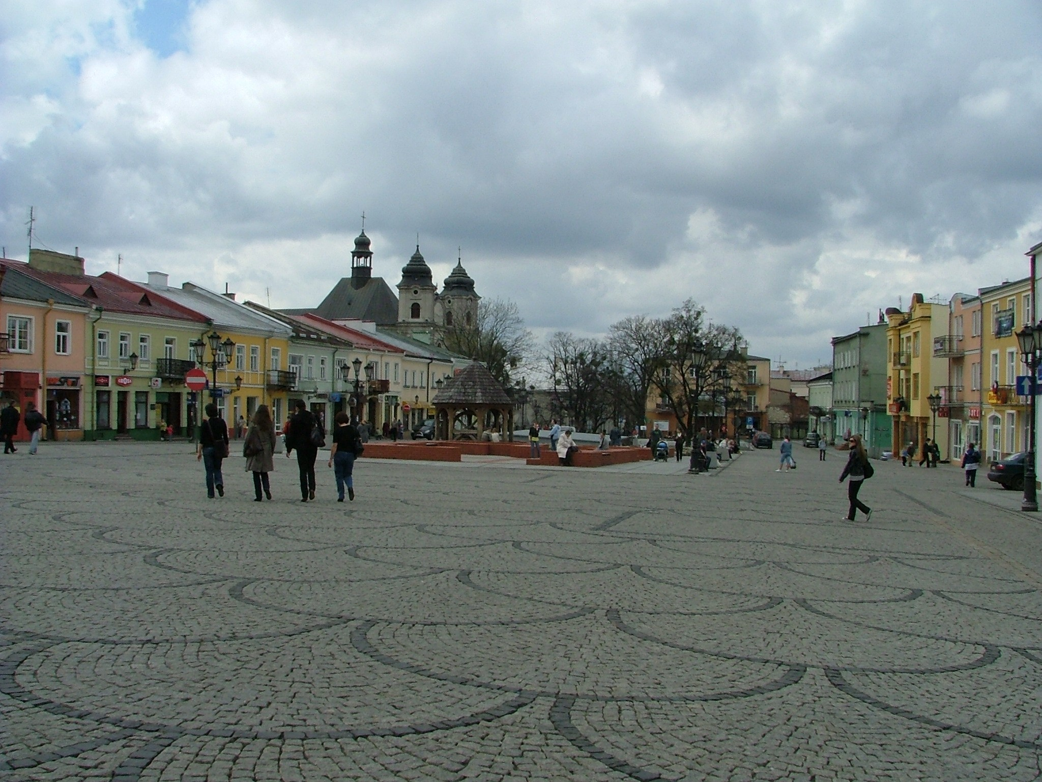 Chełm, Plac Łuczkowskiego, Starówka